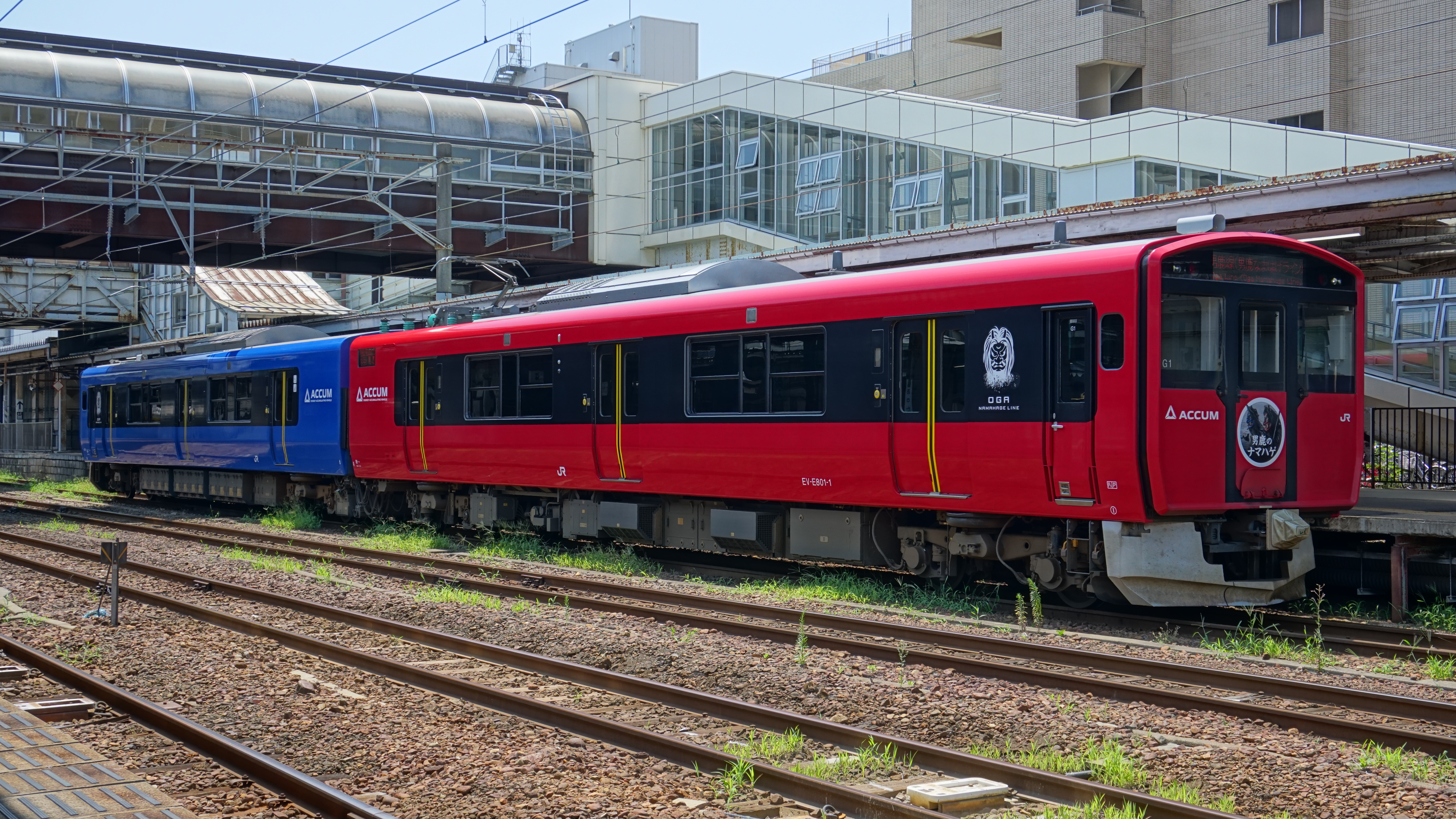 男鹿線にて営業運行を行っているEV-E801系。男鹿方のEV-E801は赤い外観となっている。赤と青は男鹿半島の伝統行事なまはげの面をイメージしたものである。